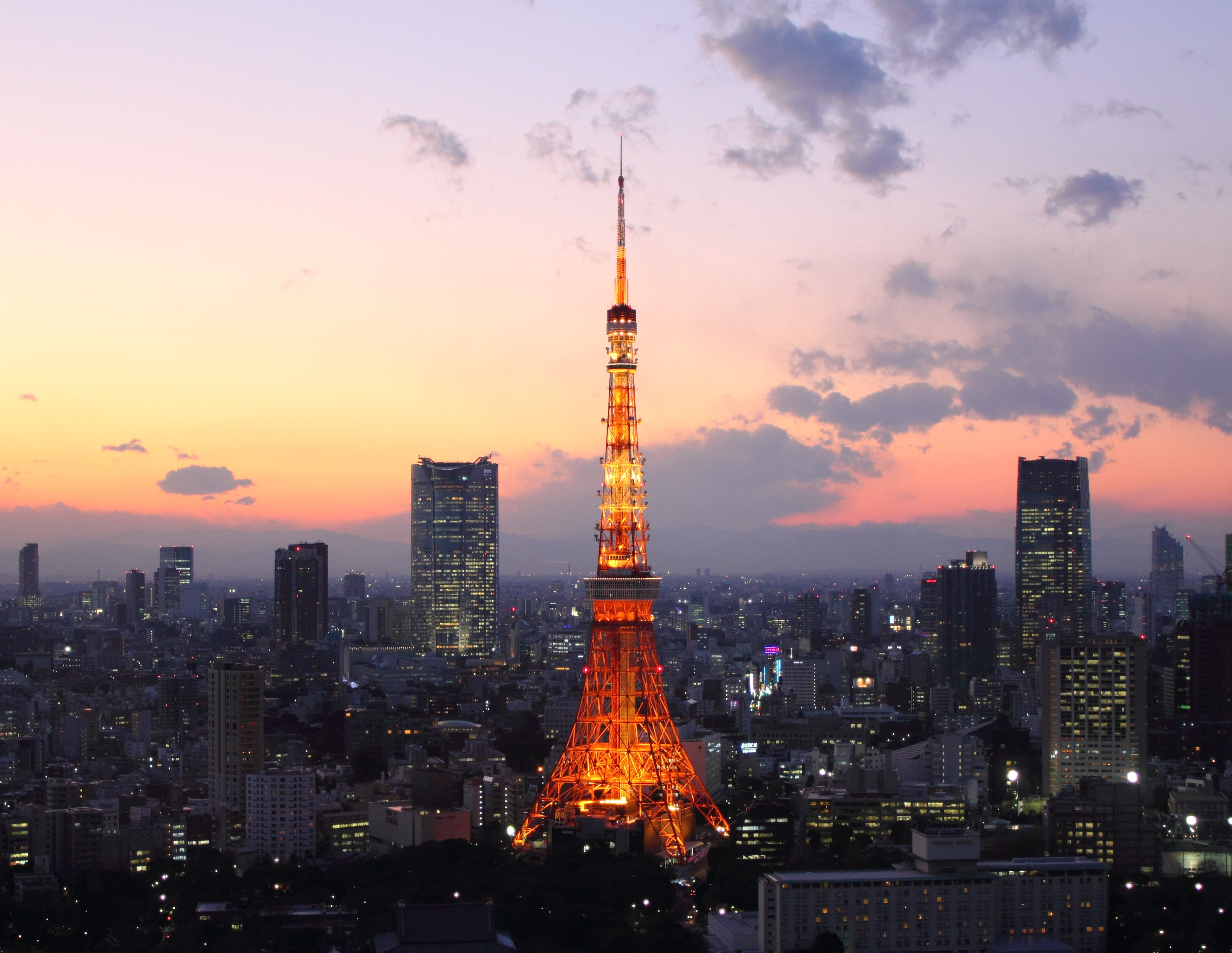 東京タワー夕暮れ（浜松町貿易センタービルより）